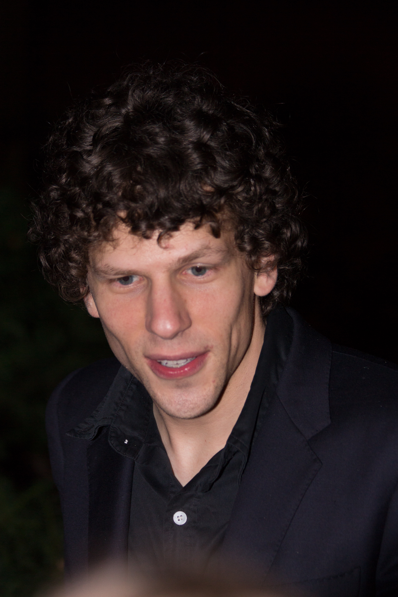 Jesse Eisenberg TIFF 2013